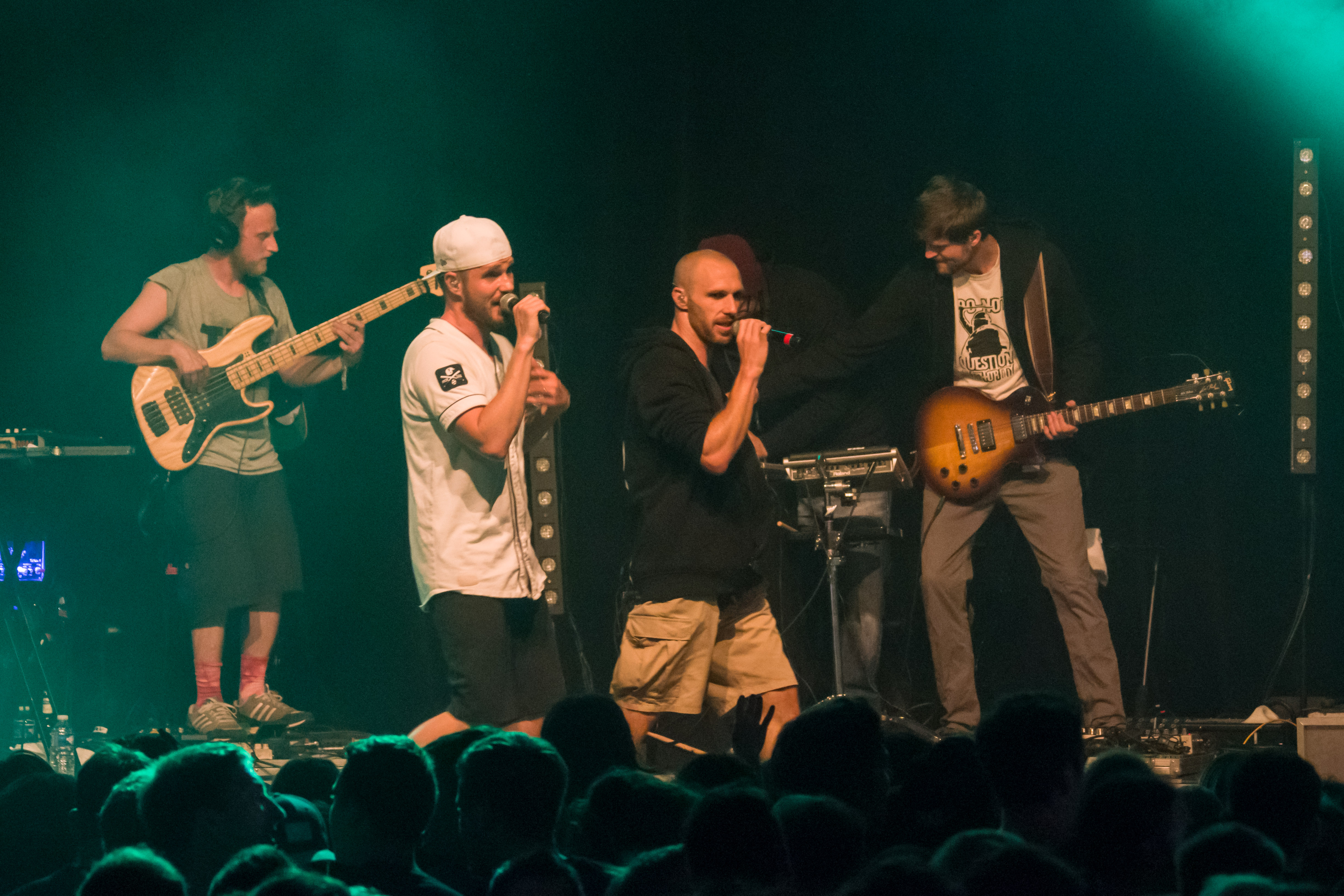 Das Zelt-Musik-Festival 2017 in Freiburg im Breisgau 15.07.2017 Irie Révolté